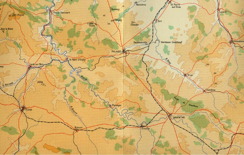 Carte géographique de la région de Falaise